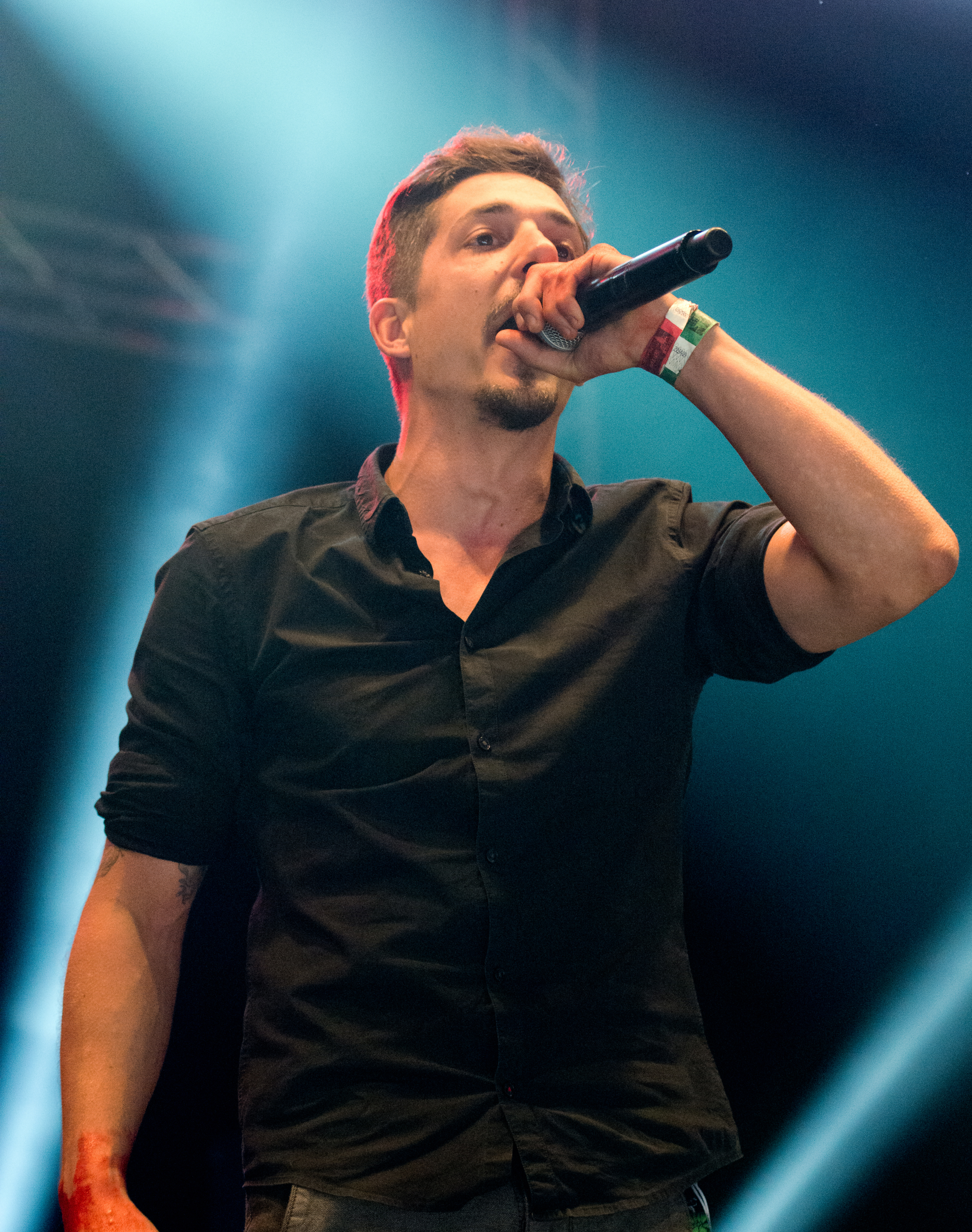 Miles to Perdition beim Wacken Open Air 2016